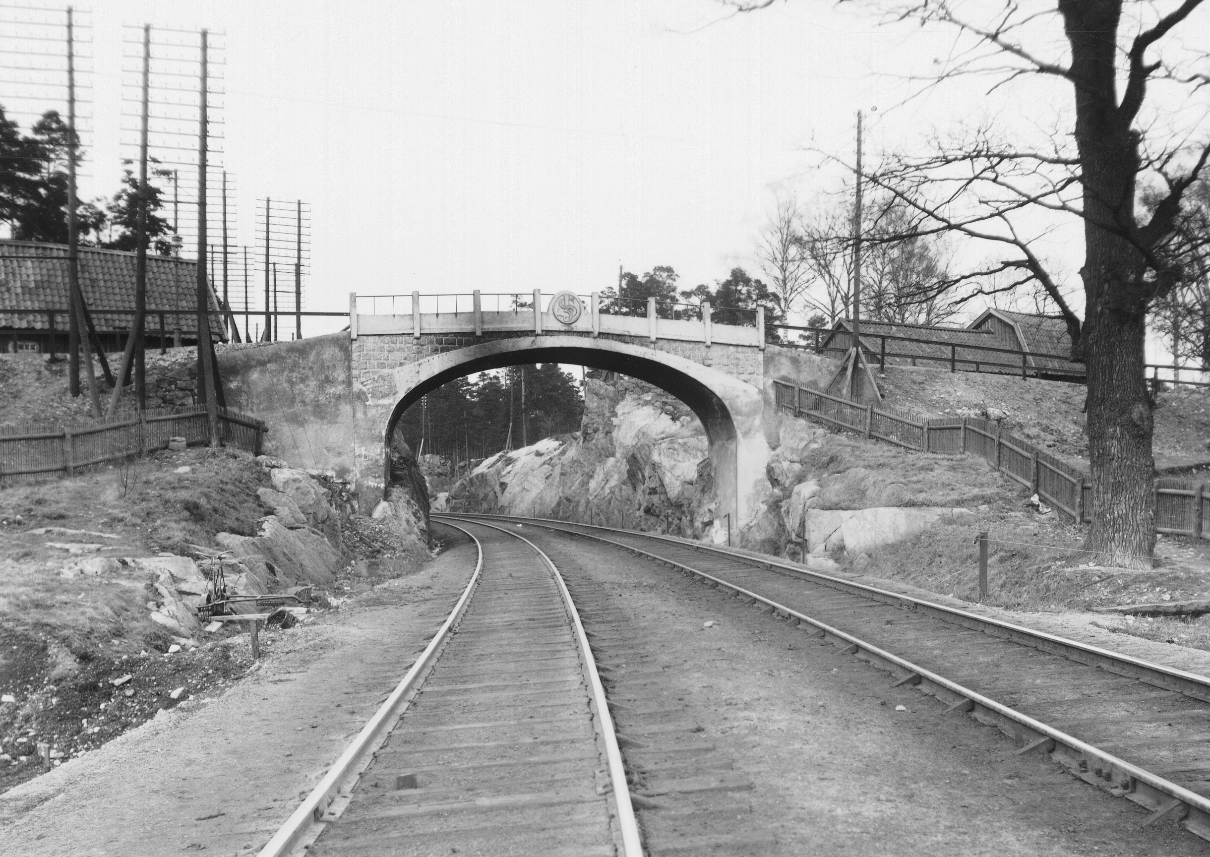 Götalandsviadukten före 1922